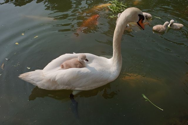 ときわ公園のはくちょう